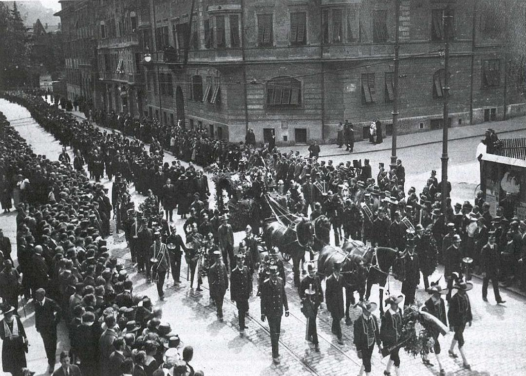 Franz Innerhofer Begräbnis in Bozen 1922